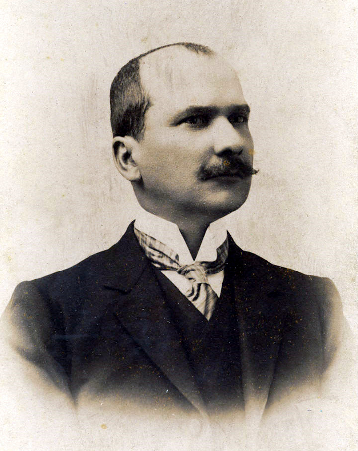 Foto No 817 Presidente de la República Tolimense nacido en Piedras en junio 5 de 1867. Miguel Abadía Méndez estudio derecho en la Universidad del Rosario, fue el último presidente de la Hegemonía Conservadora (1886-1930), y perteneció a la llamada generación de políticos gramáticos, que administraron el país basados en el poder de la retórica y el dominio del lenguaje. Electo presidente para el periodo comprendido entre 1926 y 1930, en el cual se firmaron los tratados limítrofes con Brasil, Perú y con Nicaragua por la soberanía sobre las islas de San Andrés. También tuvo que enfrentar la masacre de las bananeras en 1928 y la crisis económica de 1929. Muere en La Unión, Cundinamarca en mayo de 1947. BIBLIOGRAFÍA MEDELLIN BECERRA, JORGE ALEJANDRO, FAJARDO RIVERA, DIANA, Diccionario de Colombia, revisor: Fernando Carretero Socha, Grupo Editorial Norma Bogotá, 2005, 1074 Págs. ARIZMENDI POSADA, IGNACIO. Presidentes de Colombia I810-1990. Bogotá, Planeta, 1989. CAVALIER, GERMAN. Los tratados de Colombia. Bogotá, Kelly, 1982. DEAS, MALCOM. Del poder y la gramática, y otros ensayos sobre historia, política y literatura colombiana. Bogotá, Tercer Mundo, 1993. MONSALVE, MANUEL. Colombia, posesiones presidenciales 1810-1954. Bogotá, Iqueima, 1954. ENLACES Biografía de Miguel Abadía Méndez